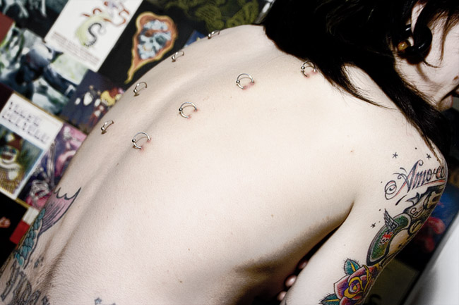 Piercing + Dolor (in Holy Week) "El futuro tiene muchos nombres. Para los débiles es lo inalcanzable. Para los temerosos, lo desconocido. Para los valientes es la oportunidad." Victor Hugo